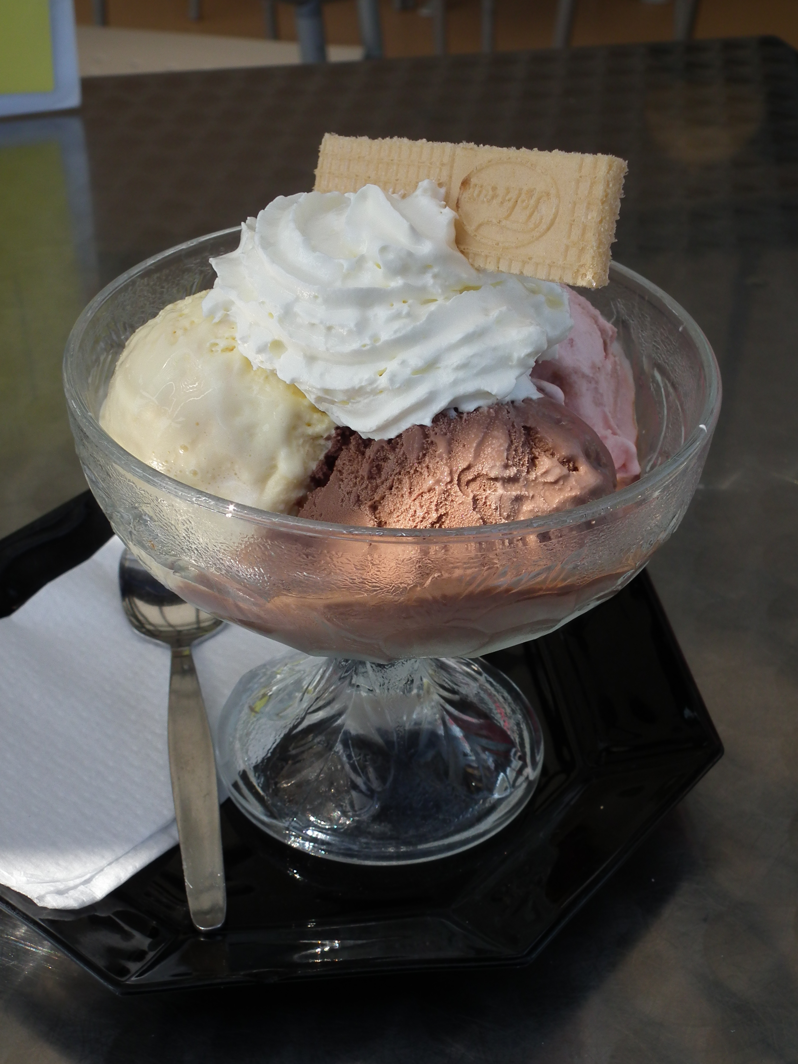 Becher gemischtes Eis (Vanille, Erdbeer, Schokolade) mit einem Klecks geschlagener Sahne und einer Waffel